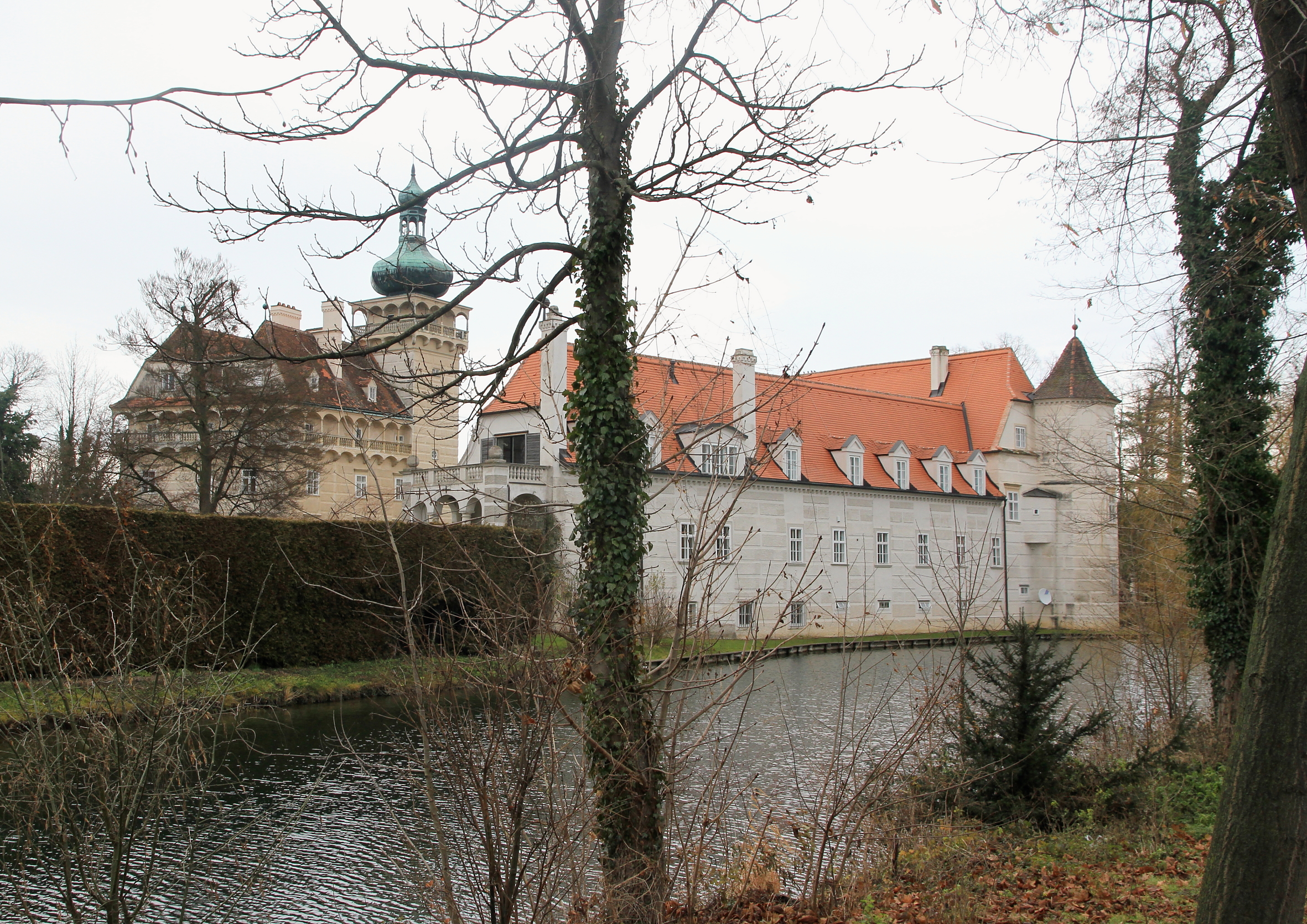 Schloss Pottenbrunn im St.Pöltner Stadtteil Pottenbrunn. Links das viergeschossige "Alte Schloss" und rechts das zweiflügelige "Wohnschloss".